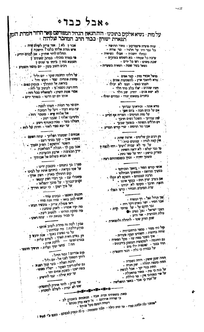 הספד בספר ברית אברהם של רבי אברהם צבי הירש פצנובסקי